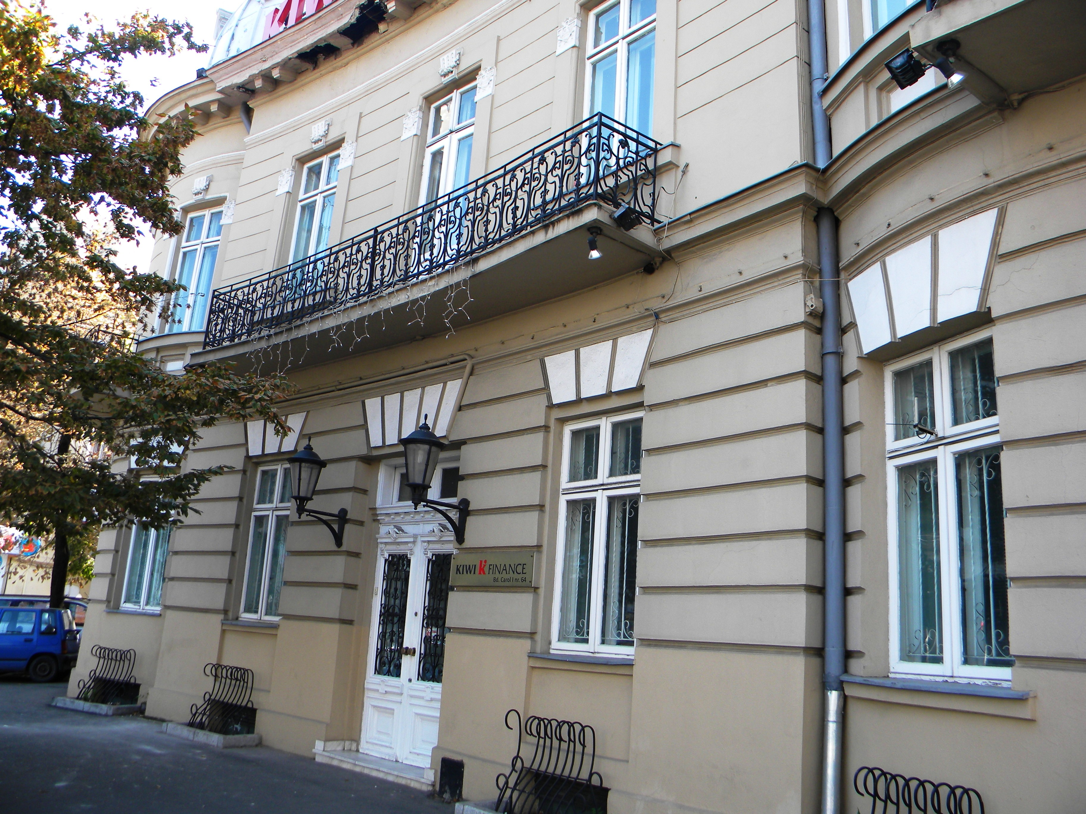 Imobil pe Bd. Carol I, nr. 64, Bucuresti sect. 2